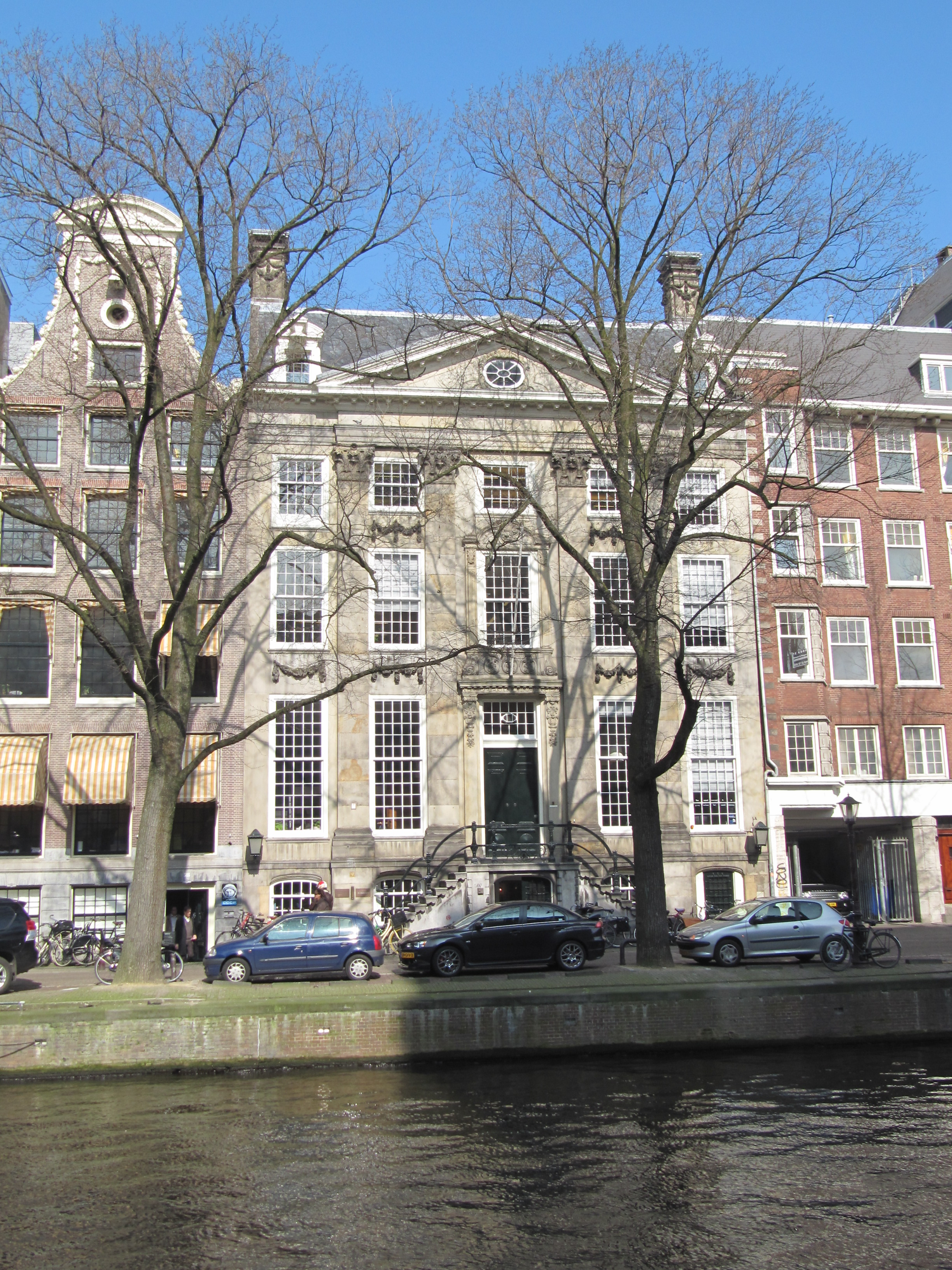 RM1667 Herengracht 507.jpg